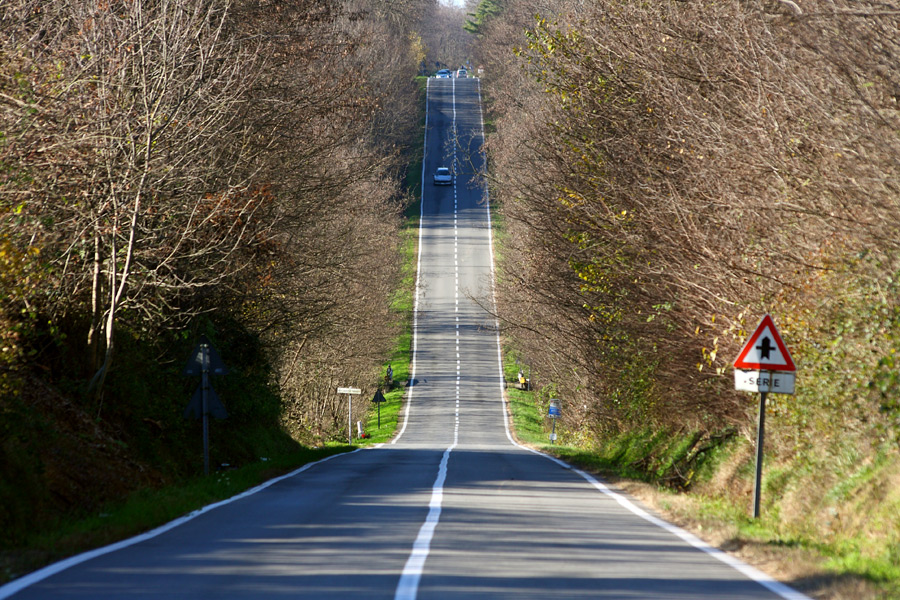 Saliscendi della Strada Provinciale 20 tra Barengo (NO) e Fara Novarese (NO)